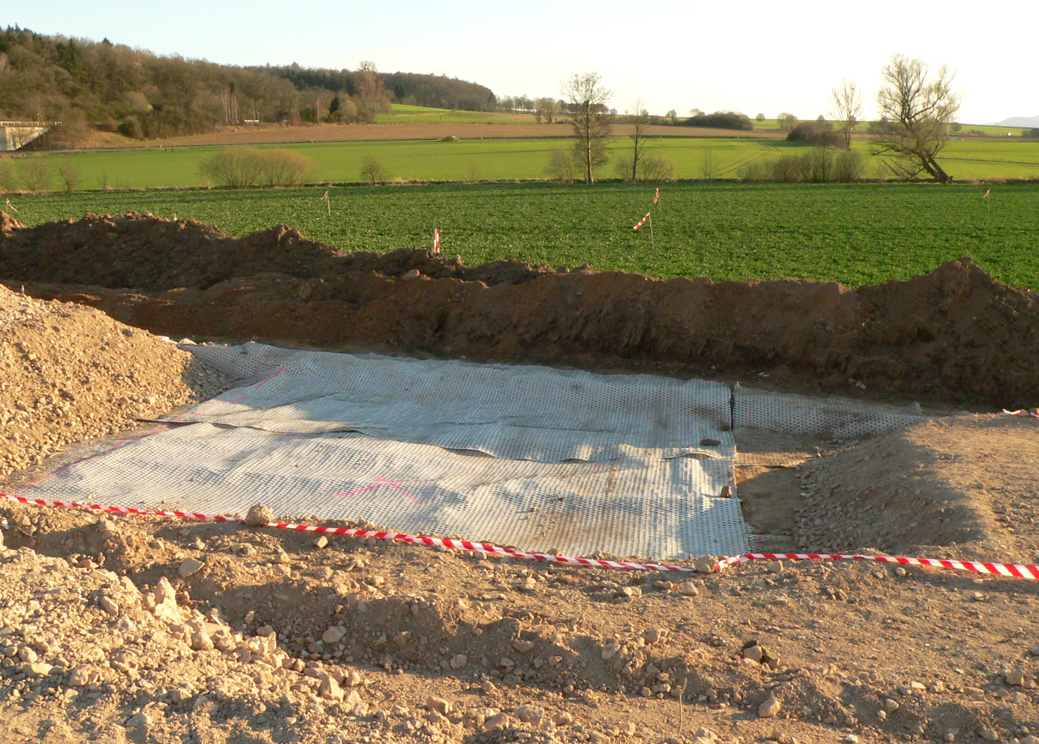 Ausgrabungsstelle Grubenhaus bei Afferde